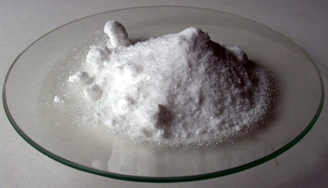 Mg(NO3)3